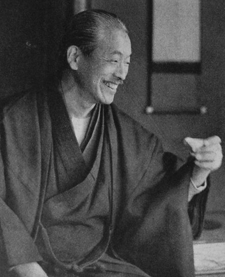 杯を傾ける泉山三六